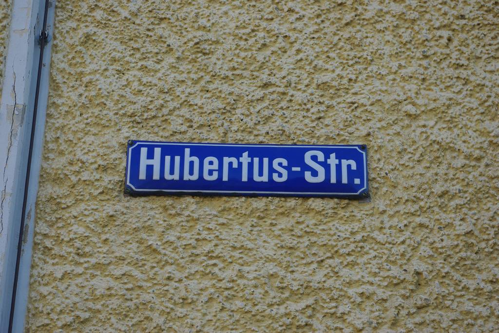 Schild an der Hubertusstraße in 83435 Bad Reichenhall